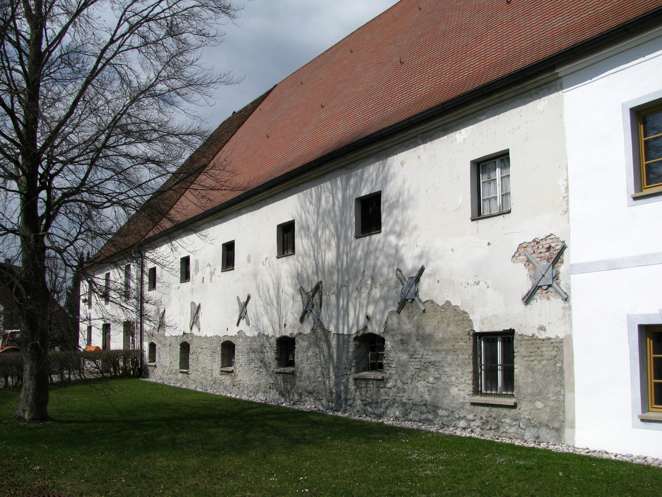 Ehem. Klostermeierhof, Südflügel